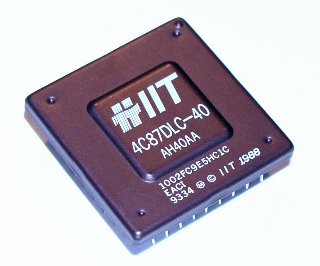 Mikroprozessor von IIT Typ 4C87DLC, produziert auf den Philippinen